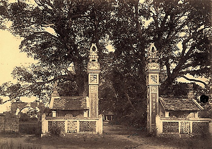 Đền Voi Phục thời Pháp thuộc, ảnh do bác sĩ Hocquard chụp vào năm 1884.